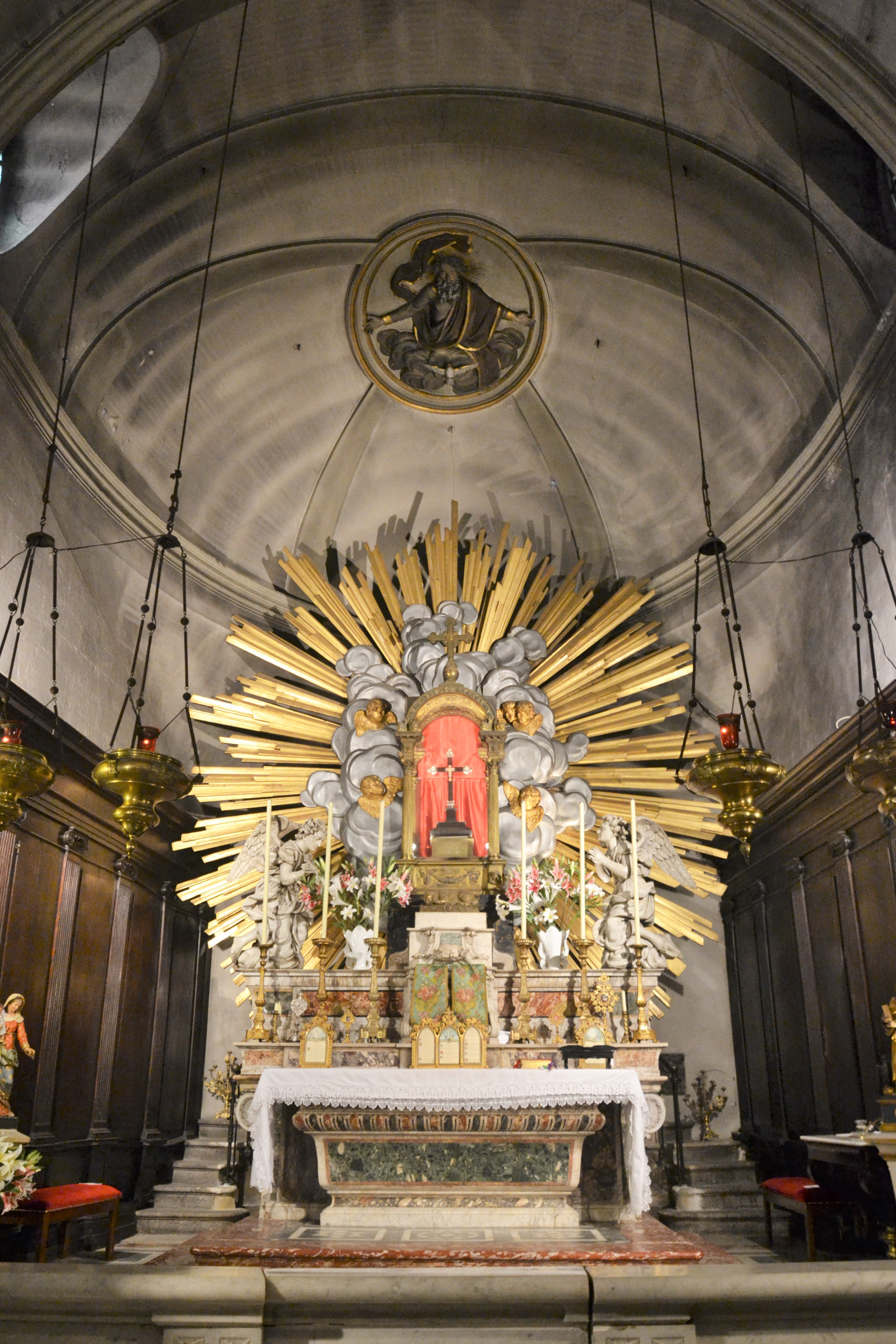 Chapelle des pénitents gris rue des teinturiers à Avignon